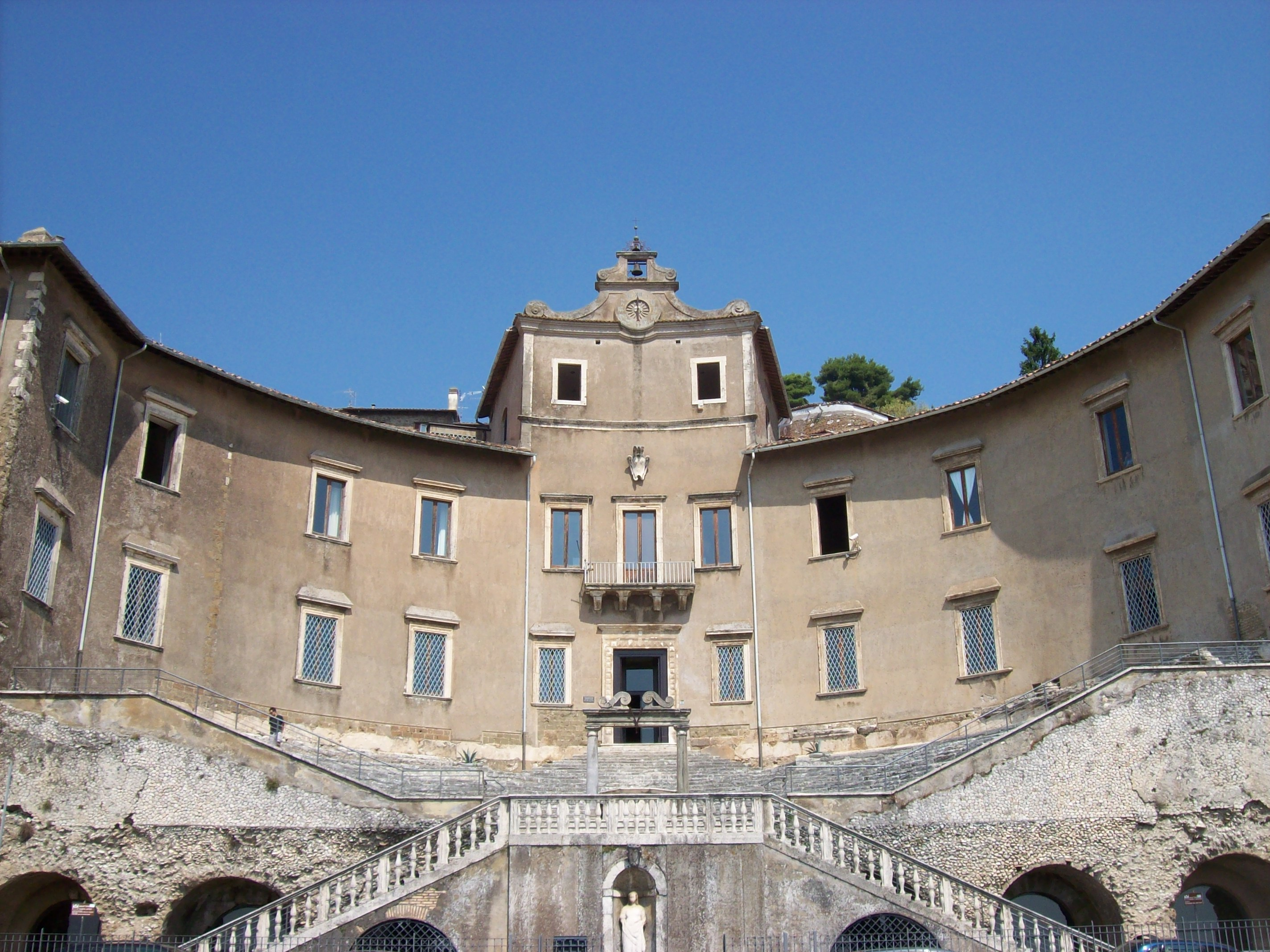 Palazzo Colonna Barberini a Palestrina, sede del museo archeologico prenestino